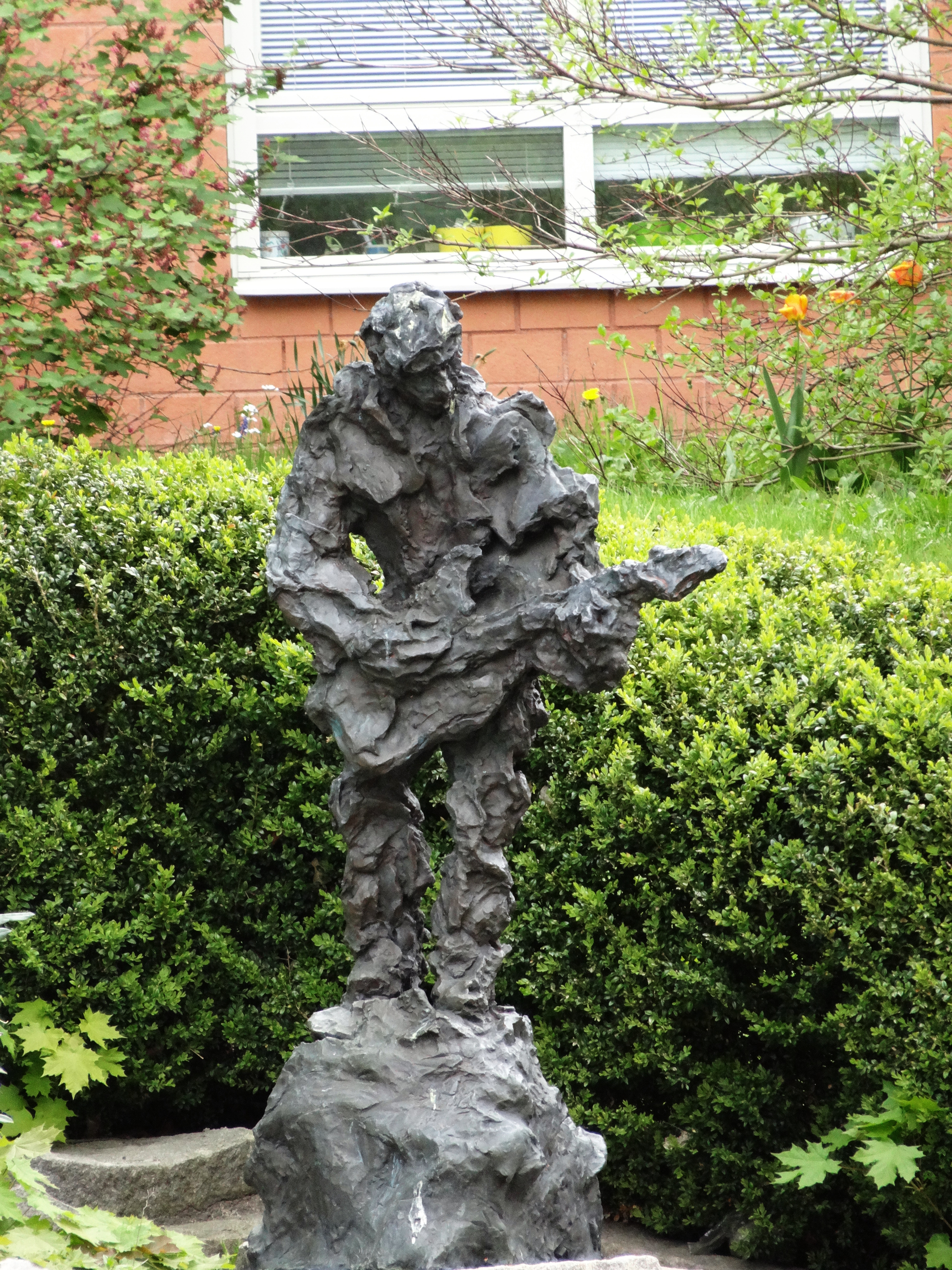 Gitarrspelare av Gun-Maria Pettersson, 1994. Norra Fjädermolnsgatan, Biskopsgården, Göteborg.